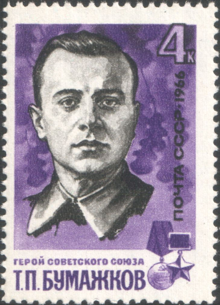 Тихон Пименович Бумажков, Герой Советского Союза. Почтовая марка СССР 1966 год